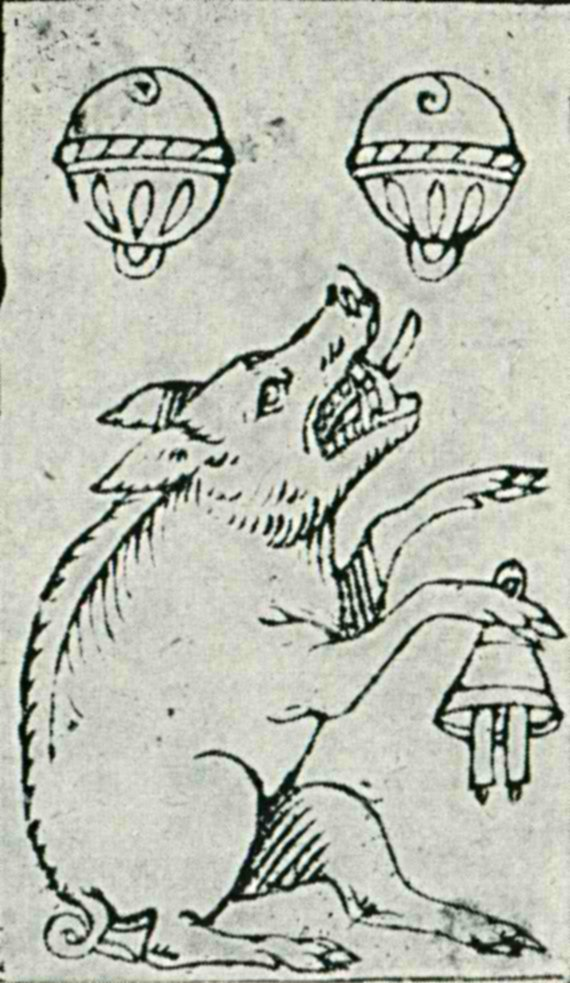 Schwein auf der Daus-Karte eines Spiels des Kartenmalers Hans Forster, Wien 1573